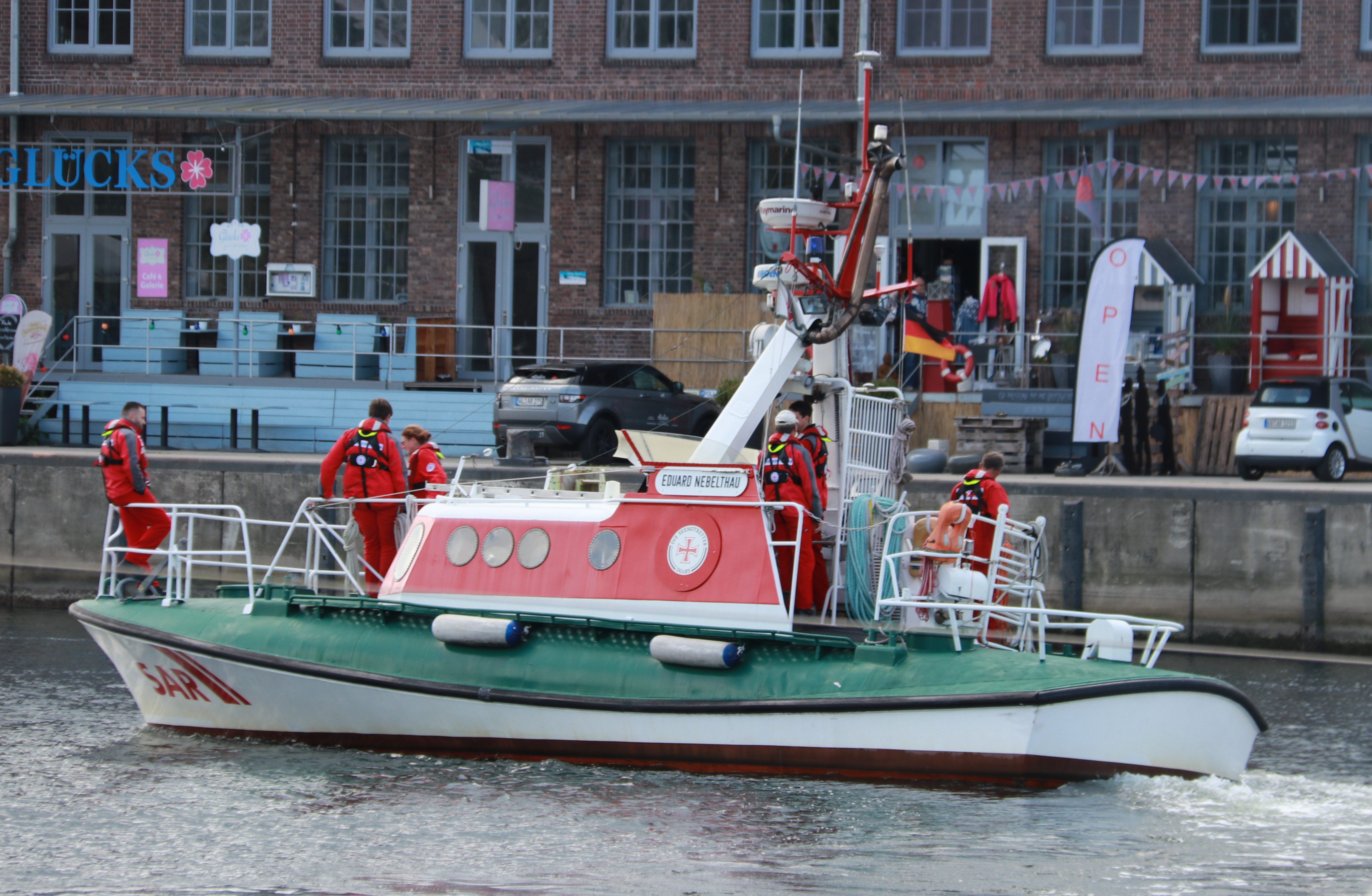 Eduard Nebelthau - Rettungsboot